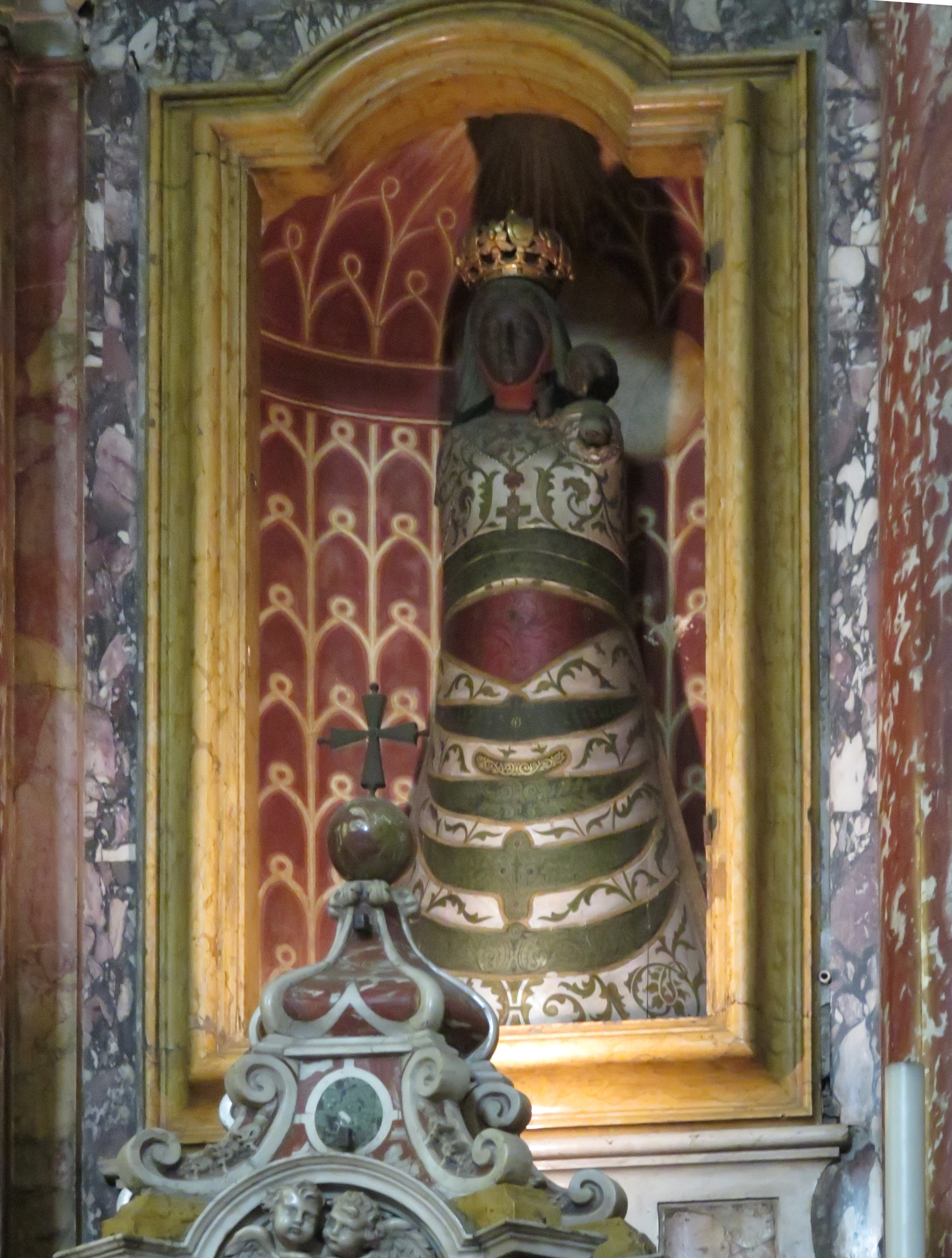 Chiesa di Loreto - Altare maggiore - Madonna di Loreto